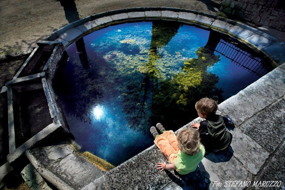 Grazie alla sua sorgente d'acqua Fontana Fozze fu un antico lavatoio paesano.